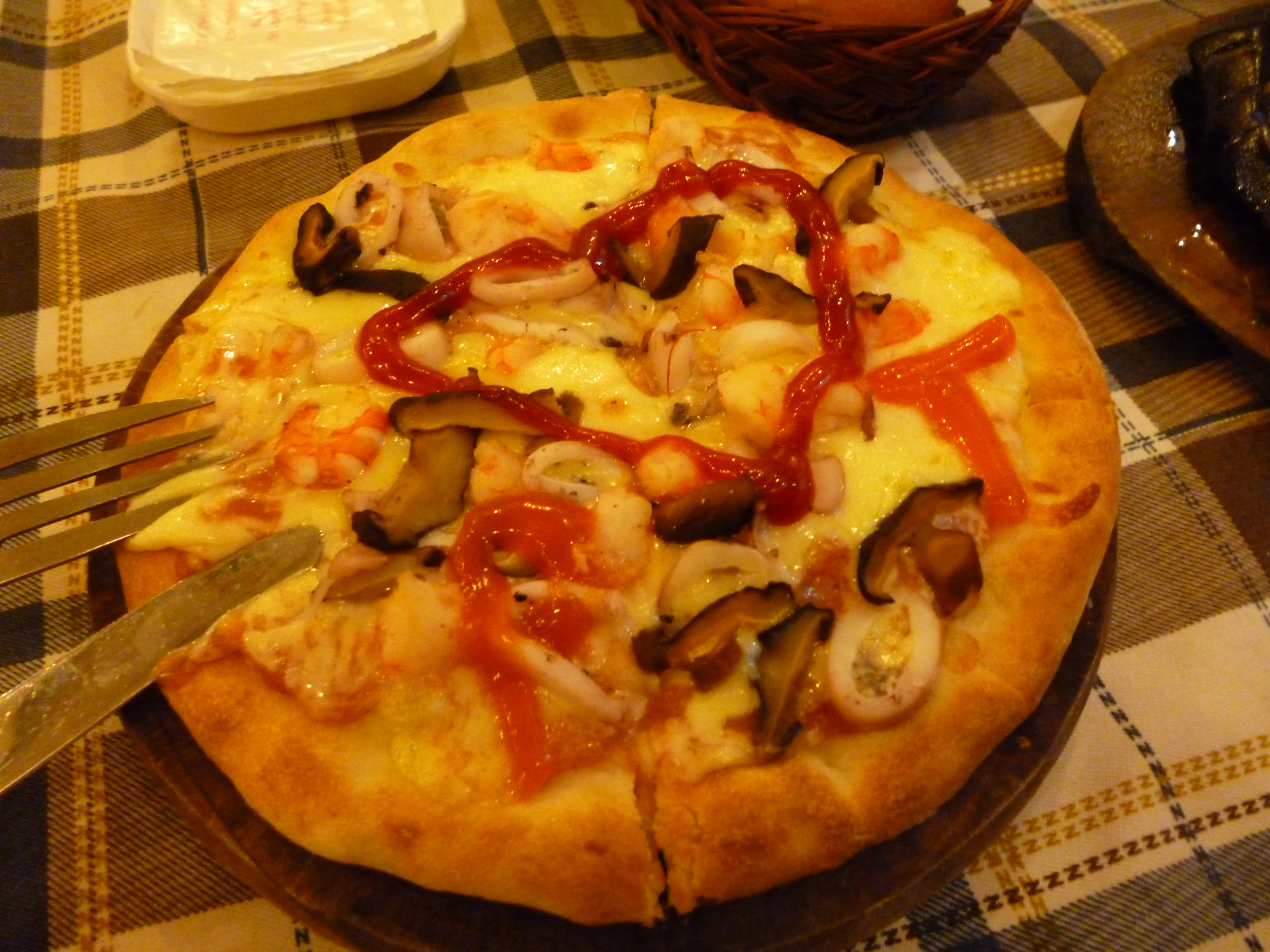 Xmas 2012 món ăn Pizza